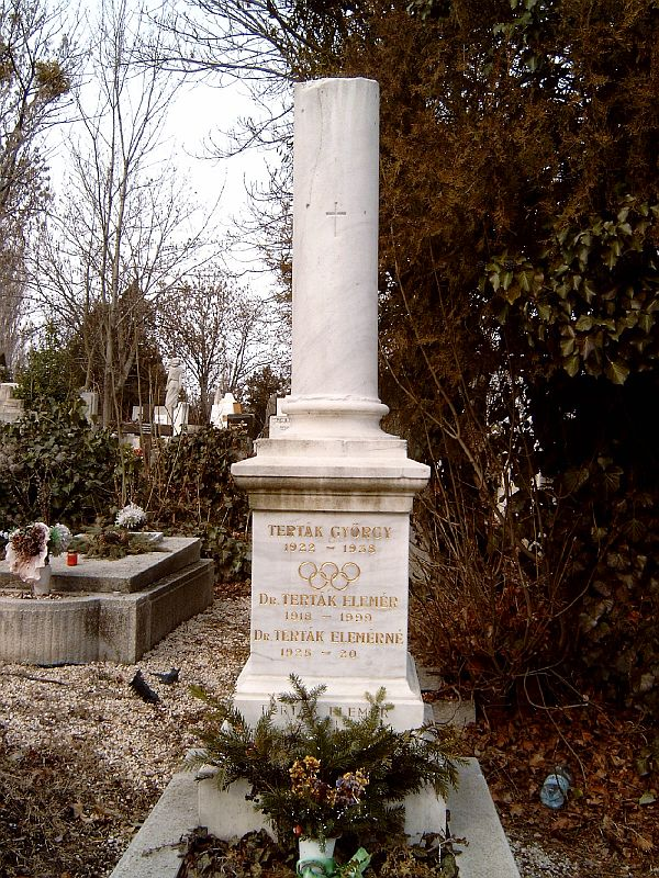 Terták Elemér (Budapest, 1918. november 2. – Budapest, 1999. július 8.) műkorcsolyázó, sportvezető sírja Budapesten. Farkasréti temető: 30/3-1-3.